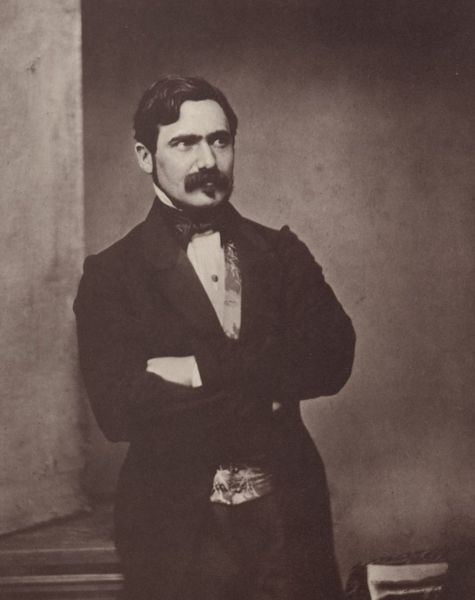 Max Joseph von Pettenkofer (1818-1901), german chemist